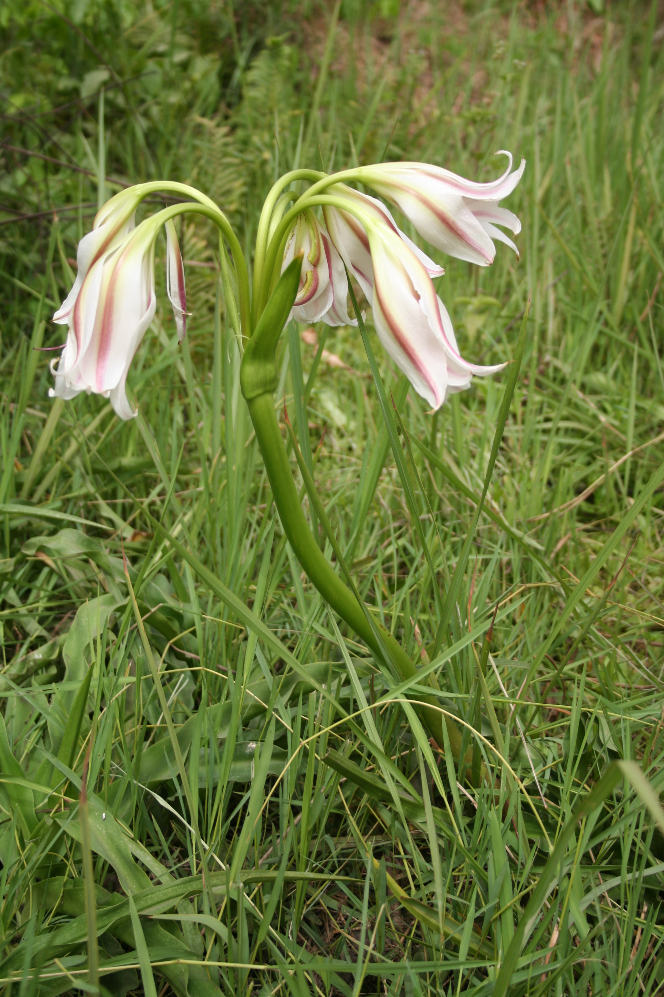 Crinum ornatum, near F.Cl. de Patako, Senegal